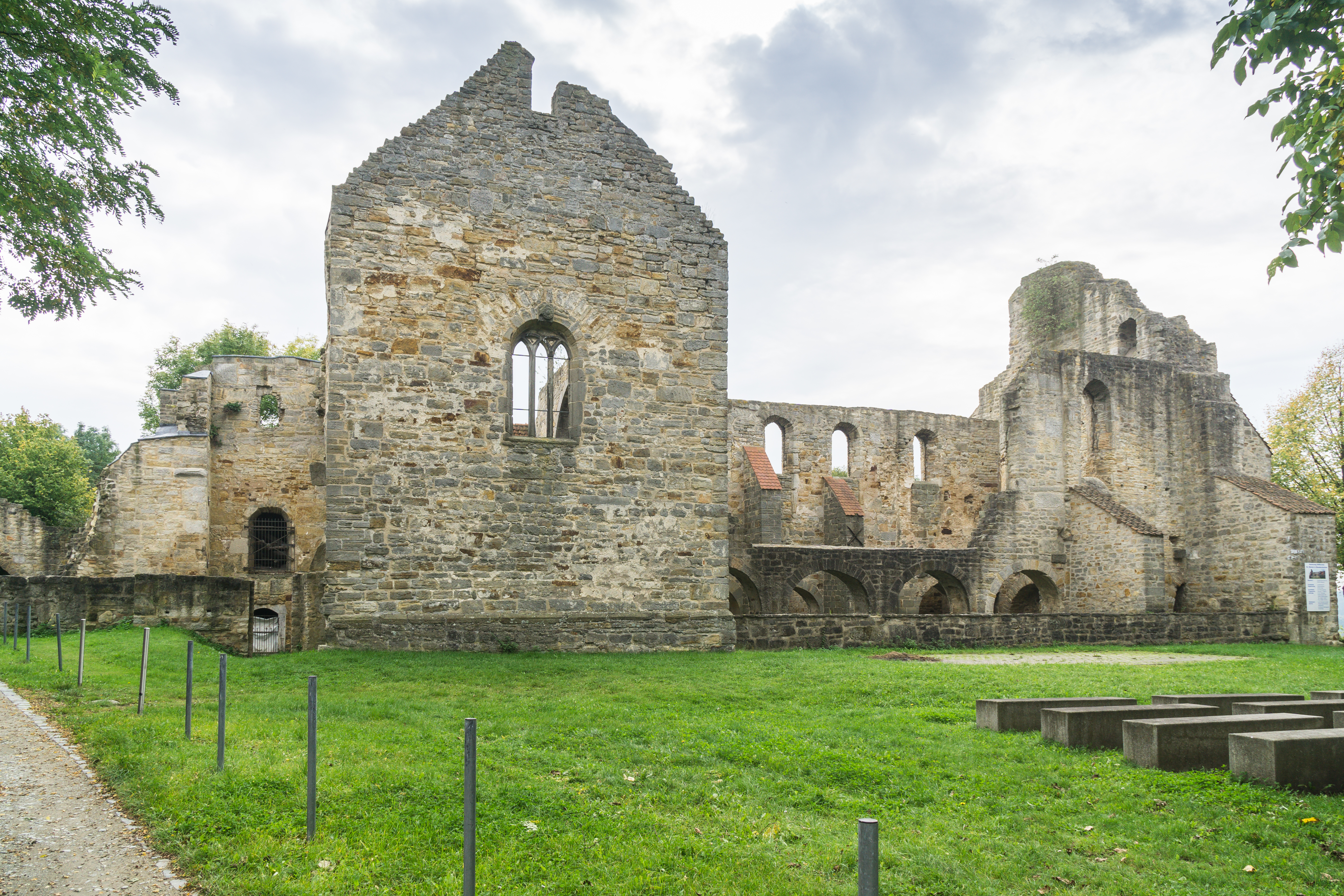 Ruine der Stiftskirche Walbeck (Kirche St. Marien, Pankratius und Anna) Bergstraße 22 auf Anhöhe, nordöstlich über dem Ort (Domberg) in Oebisfelde-Weferlingen OT Walbeck